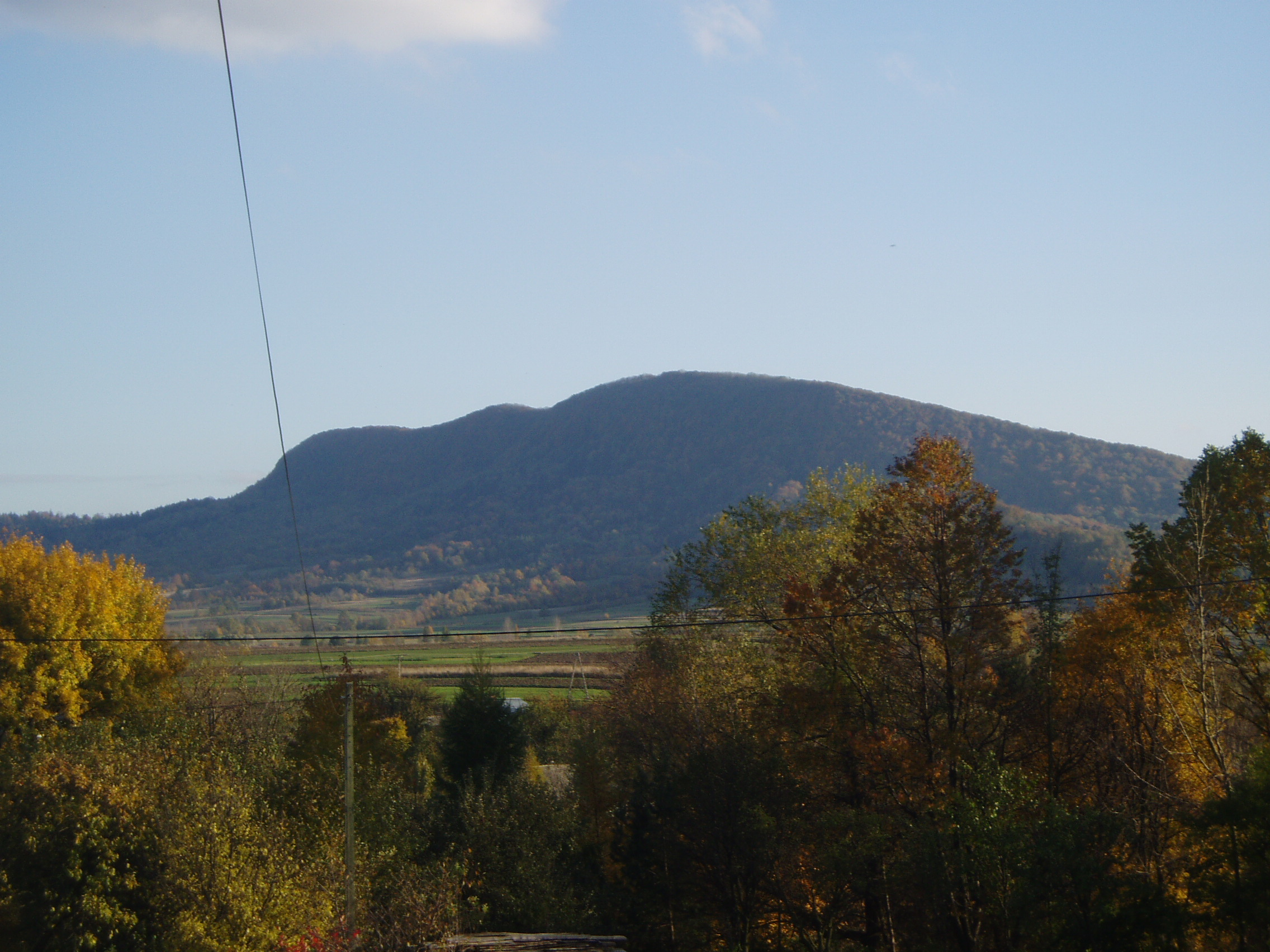 Góra Cergowa